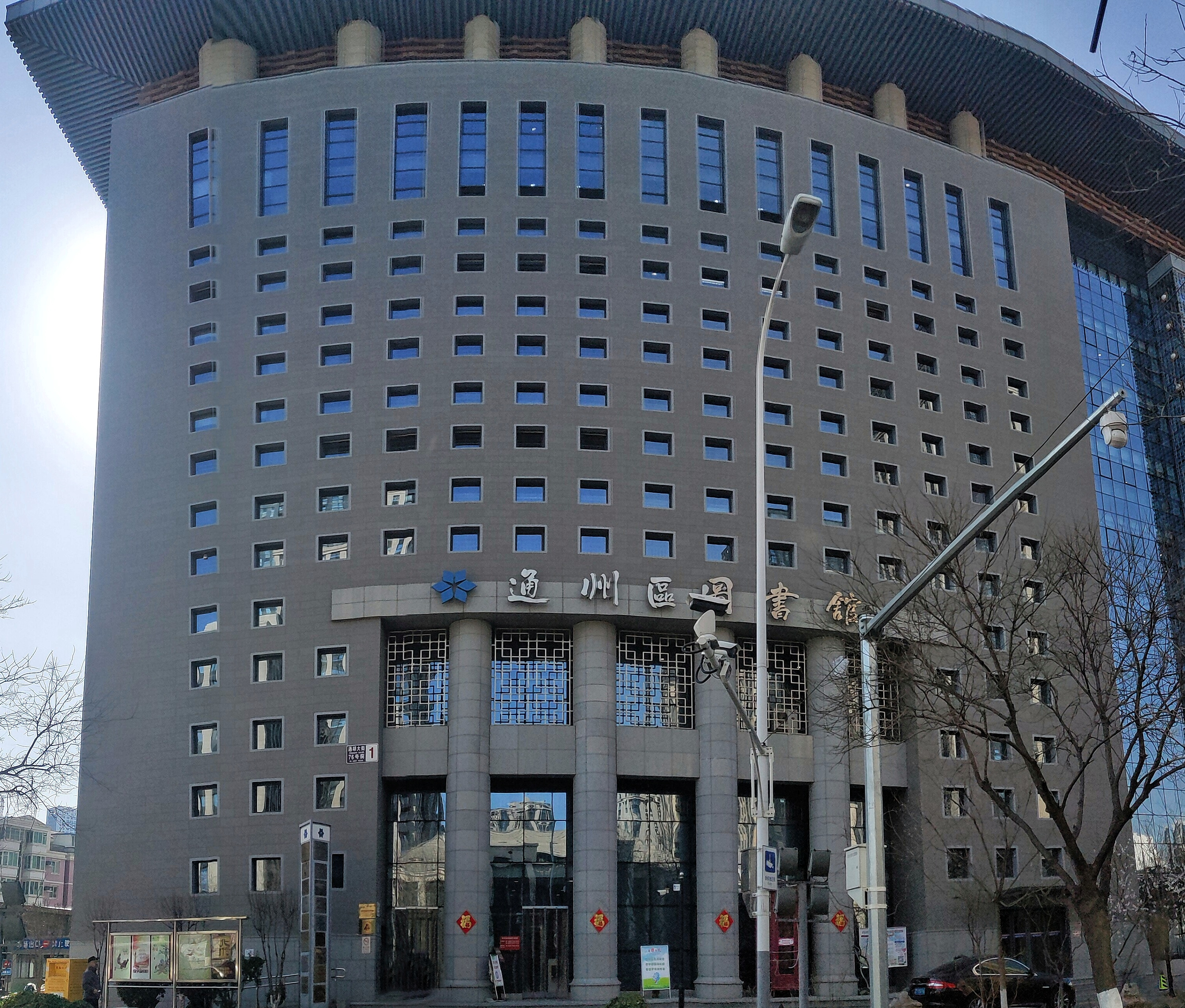 无